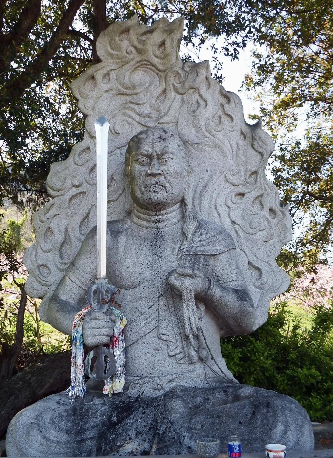 聖代寺の不動明王石像